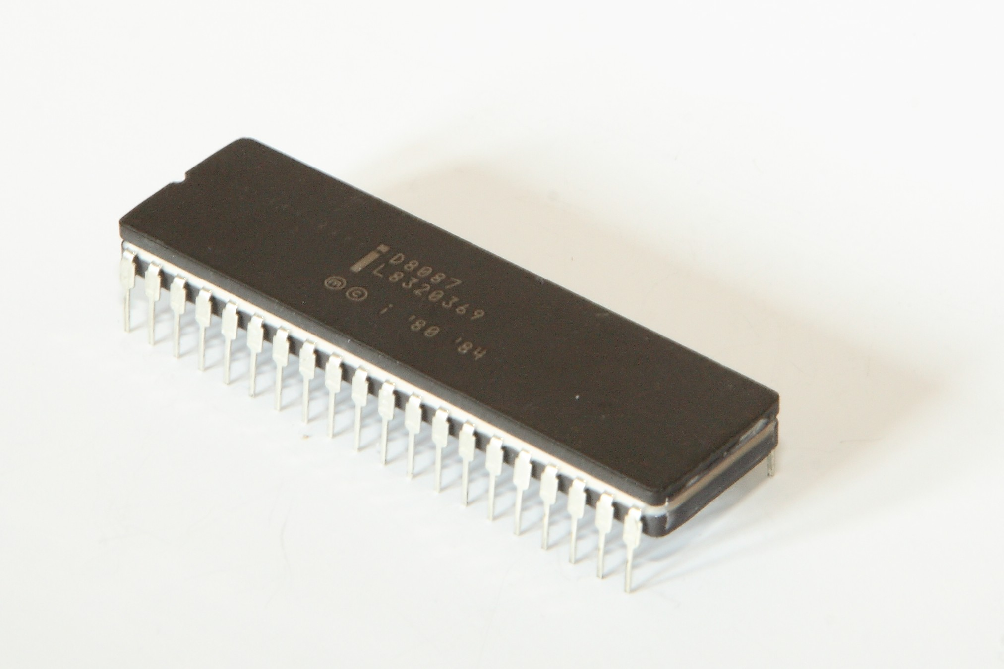 Intel 8087 Coprocessor